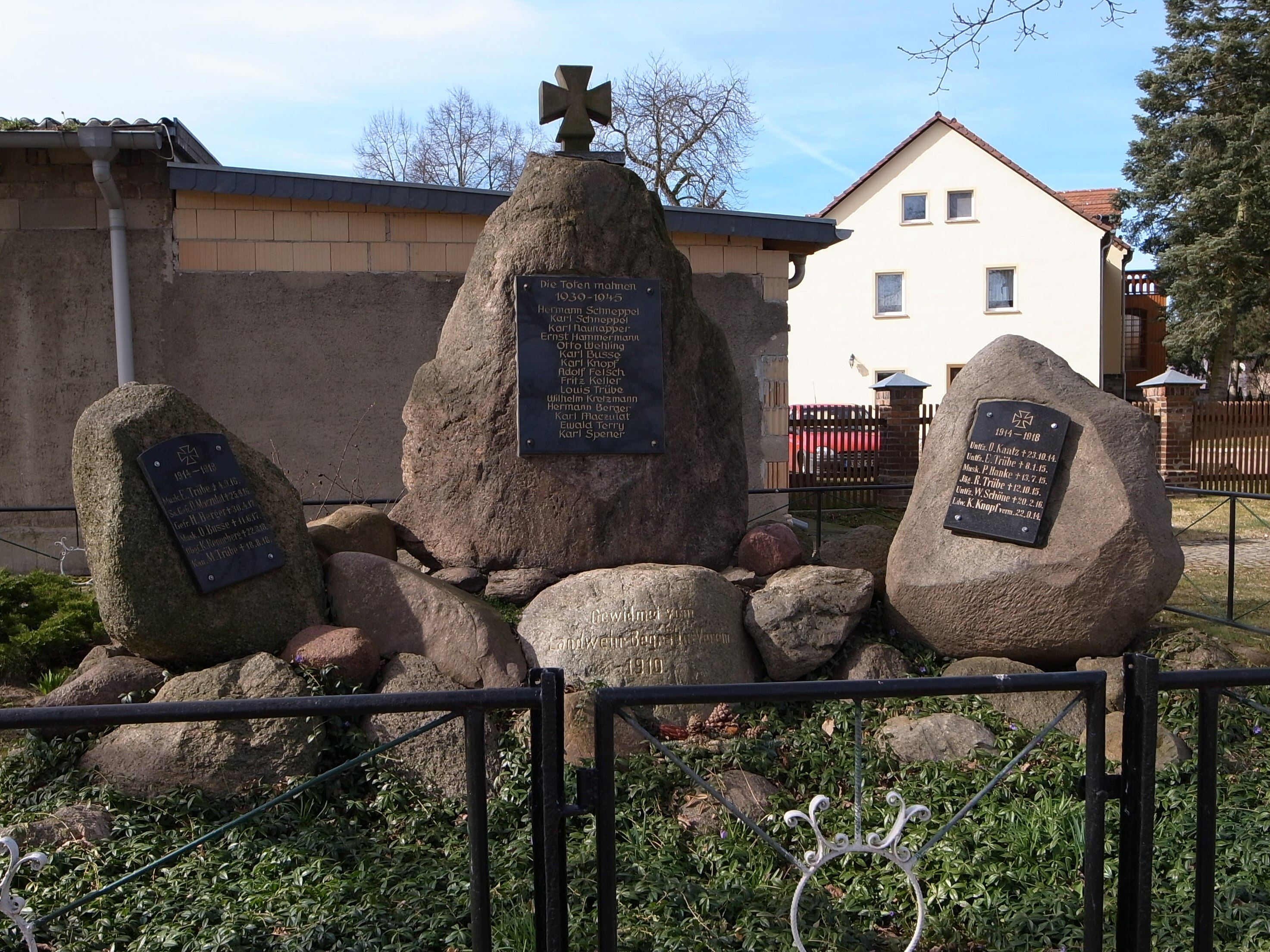 Barby (Elbe), Ortsteil Lödderitz, Kriegerdenkmal. (Kulturdenkmal im Denkmalverzeichniss Sachsen-Anhalt, Erfassungsnummer: 094 50531 000 000 000 000 [1])